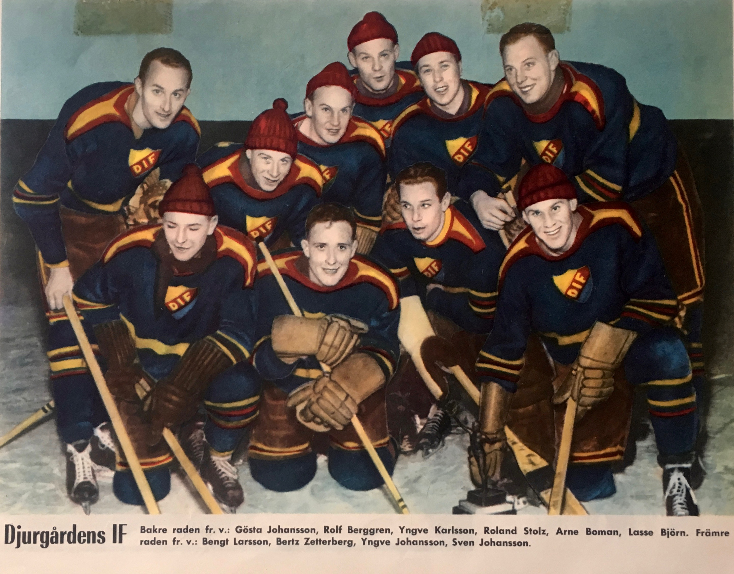 Djurgårdens IF, ishockey (herrar) 1957